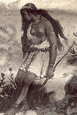 Ernest Capendu : illustration de son roman Le roi des gabiers